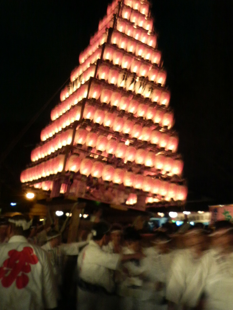 戸畑祇園 (Tobata Gion)